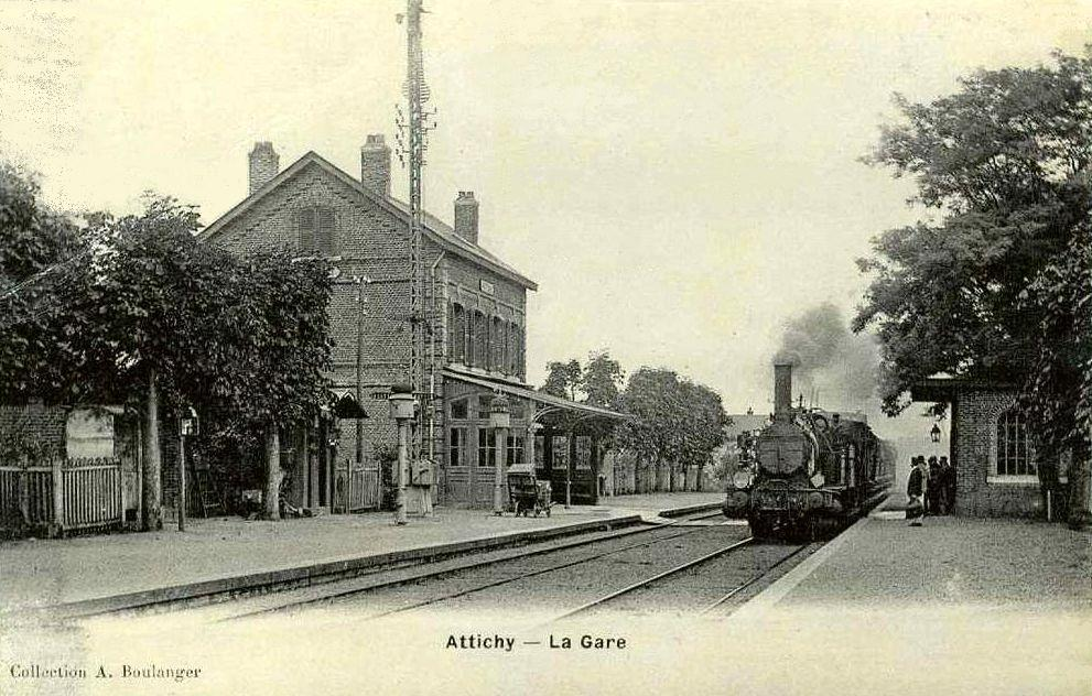 Train de voyageurs arrivant en gare.